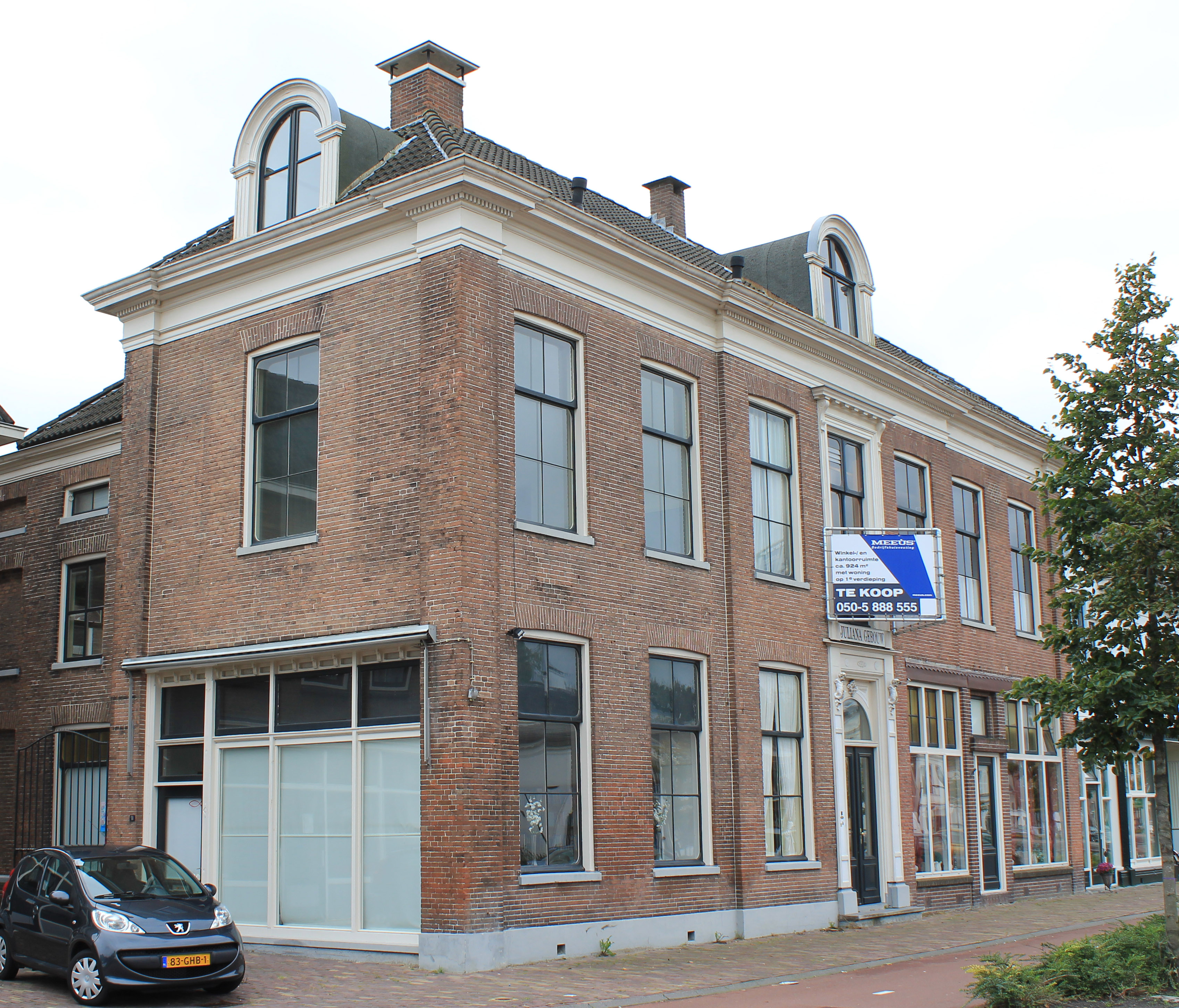 Vooraanzicht van het Gratamahuis in Assen. De drie delen van het huis zijn hier goed te zien.